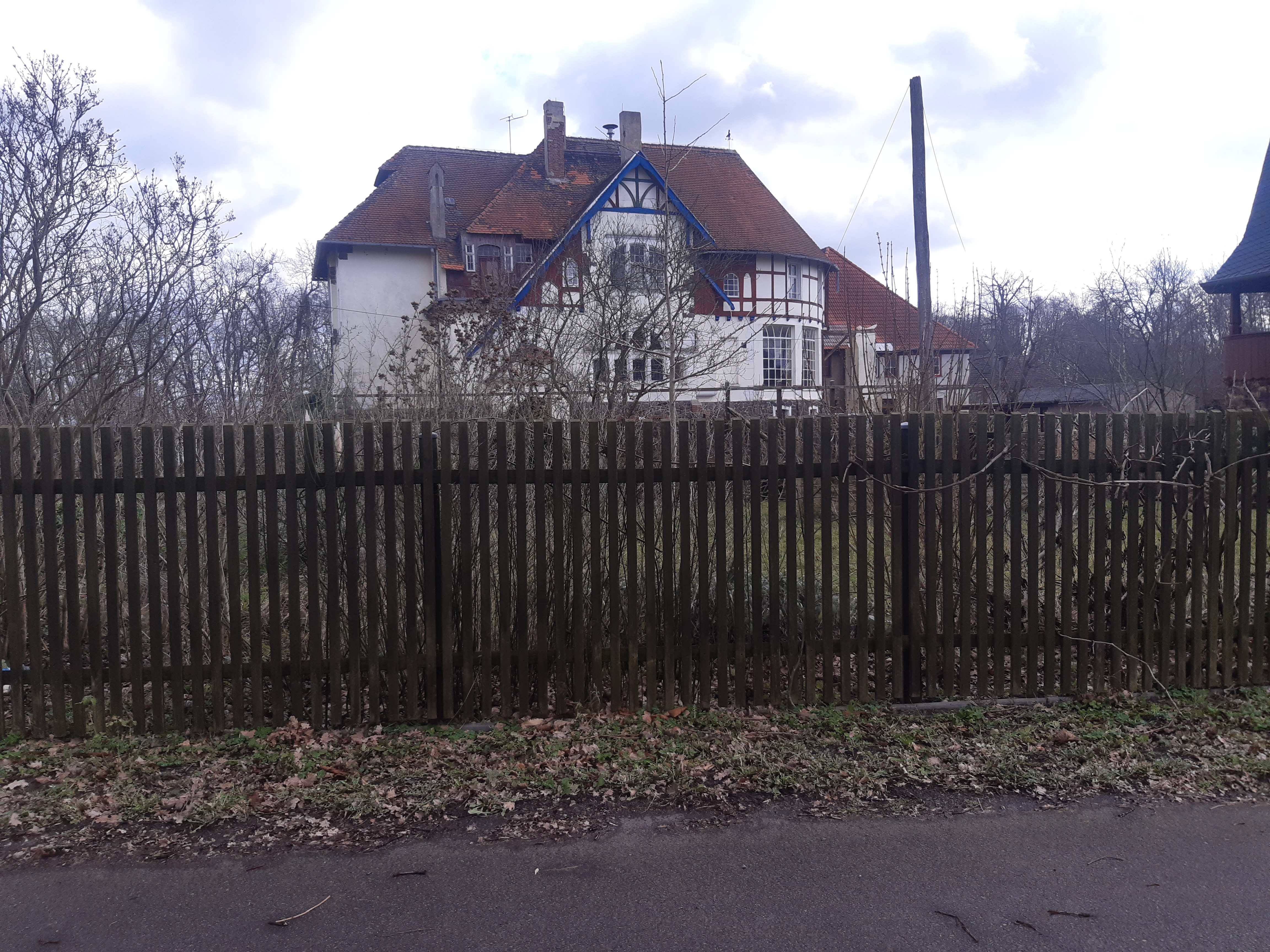 Gutshof